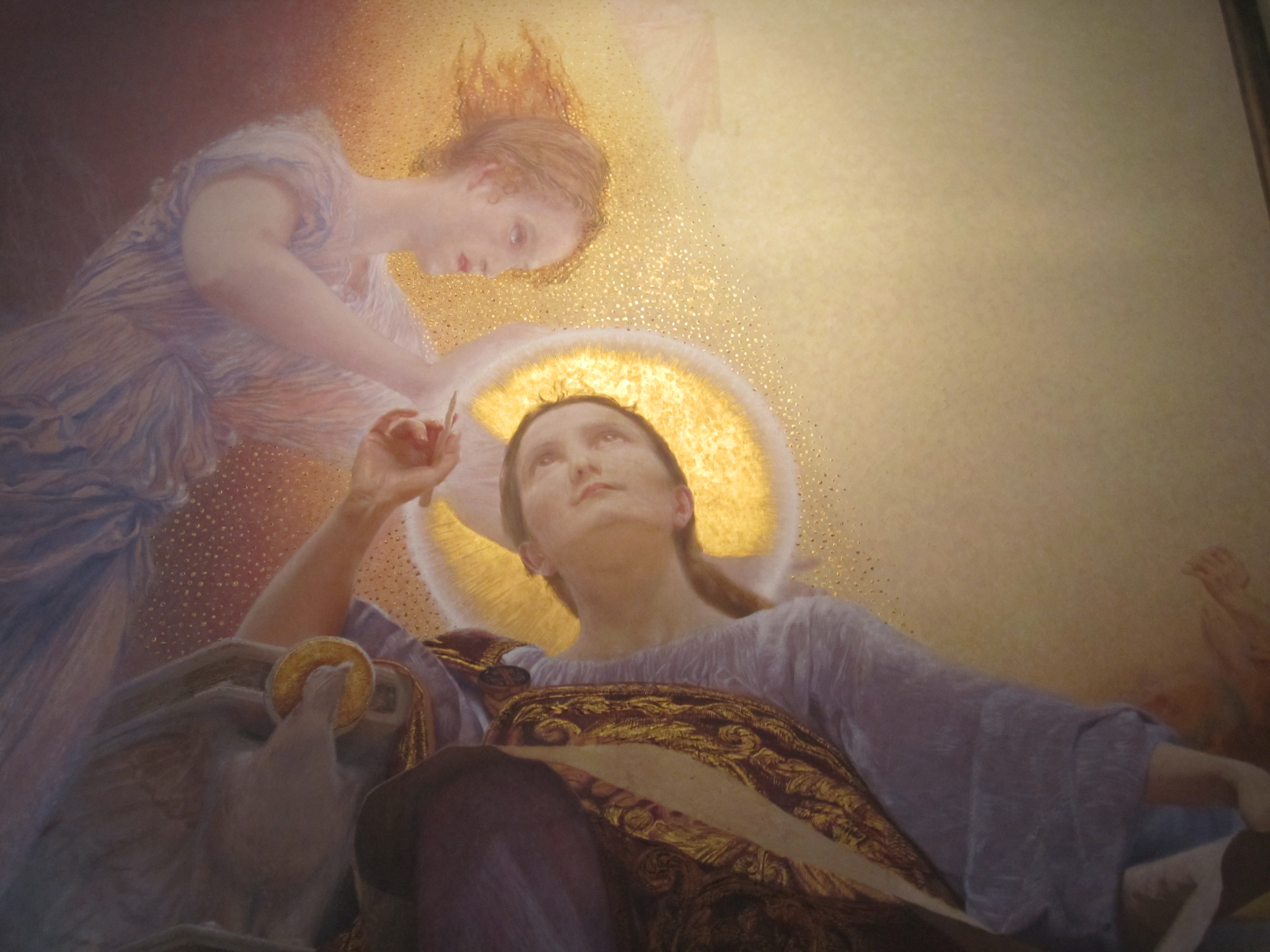 Gemälde 'Theologie' von Franz Matsch.